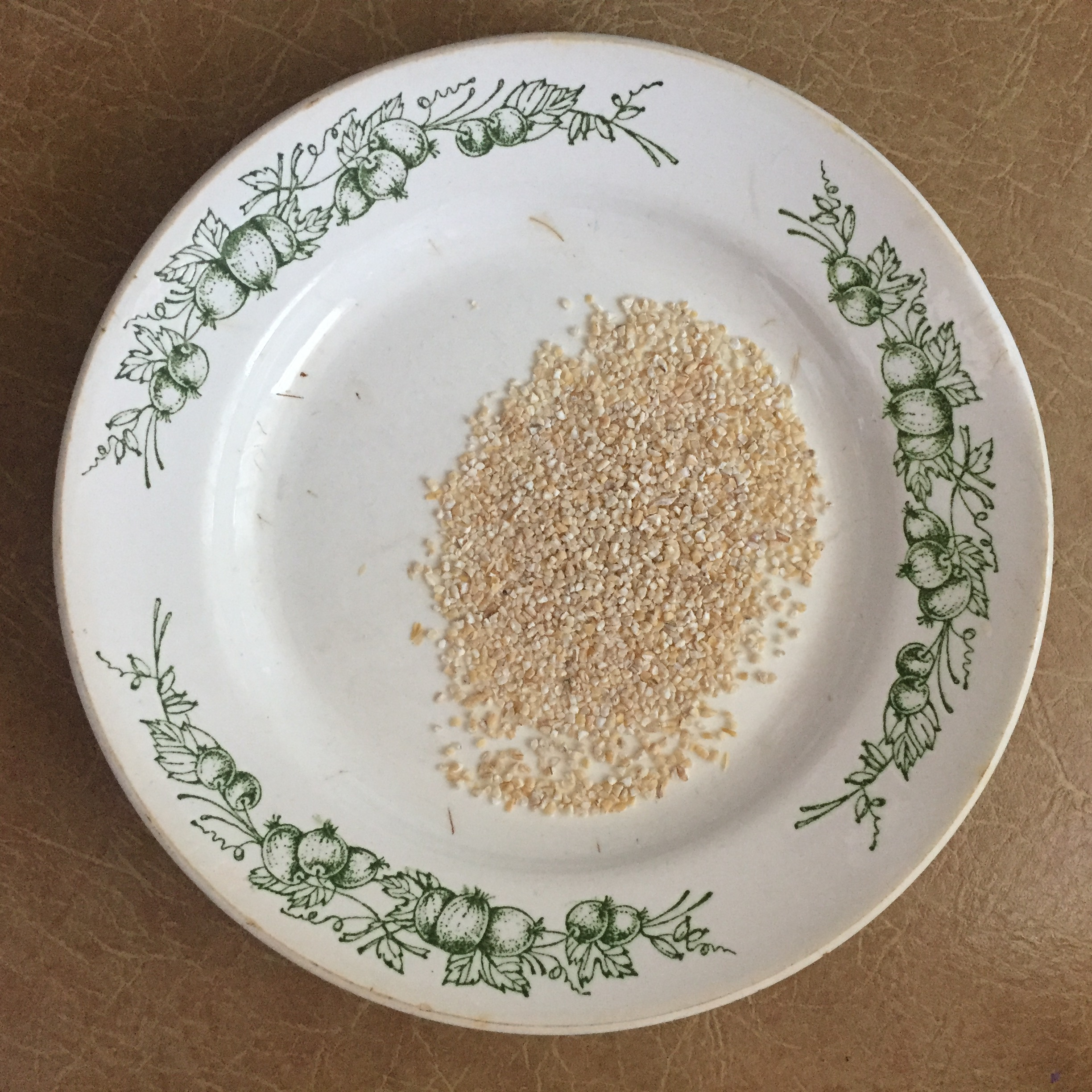 Ячневая крупа в тарелке.